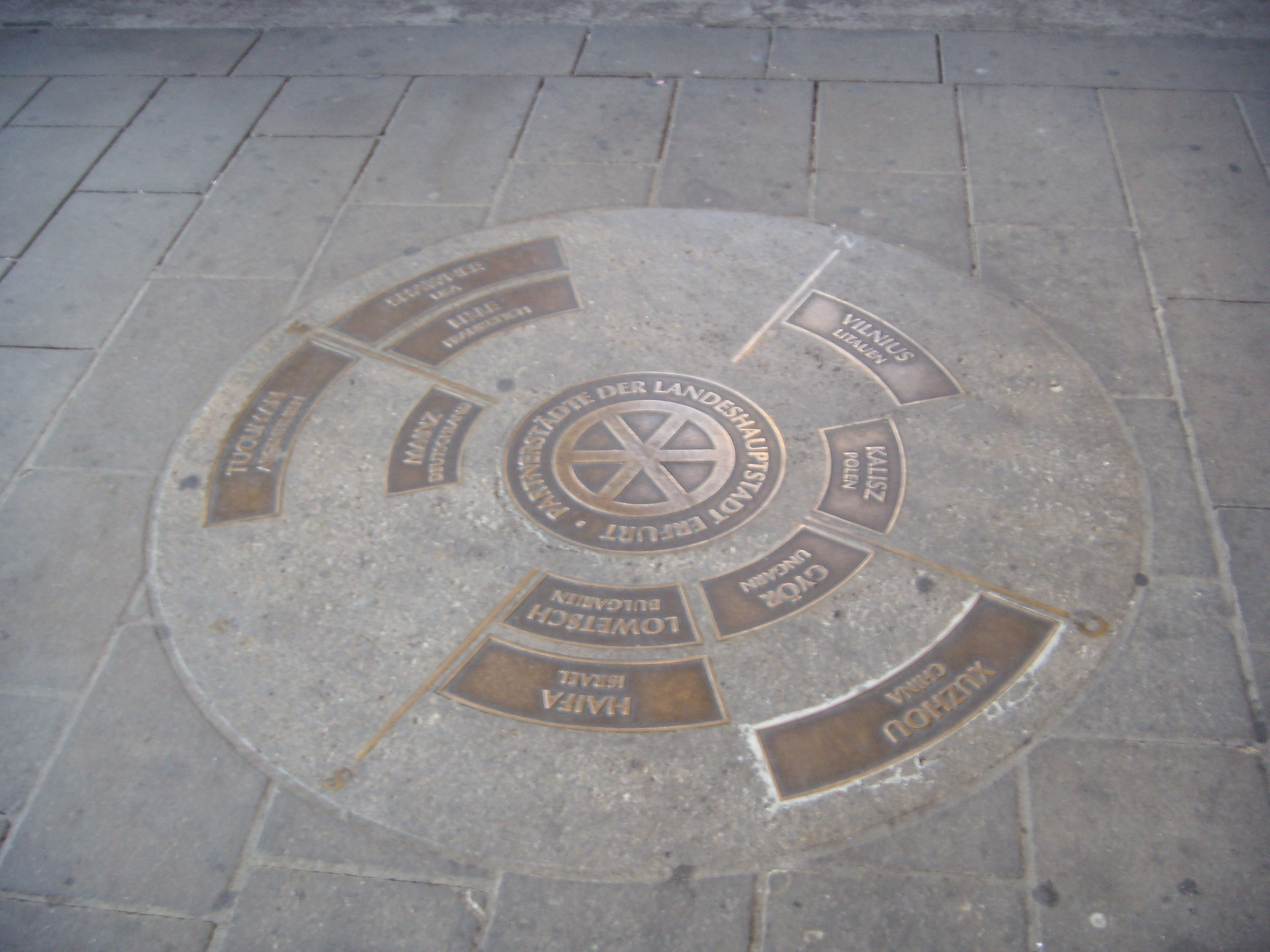 Kompass mit Himmelsrichtungen und Partnerstädten, der vor dem Rathaus Erfurt in den Boden eingelassen ist.